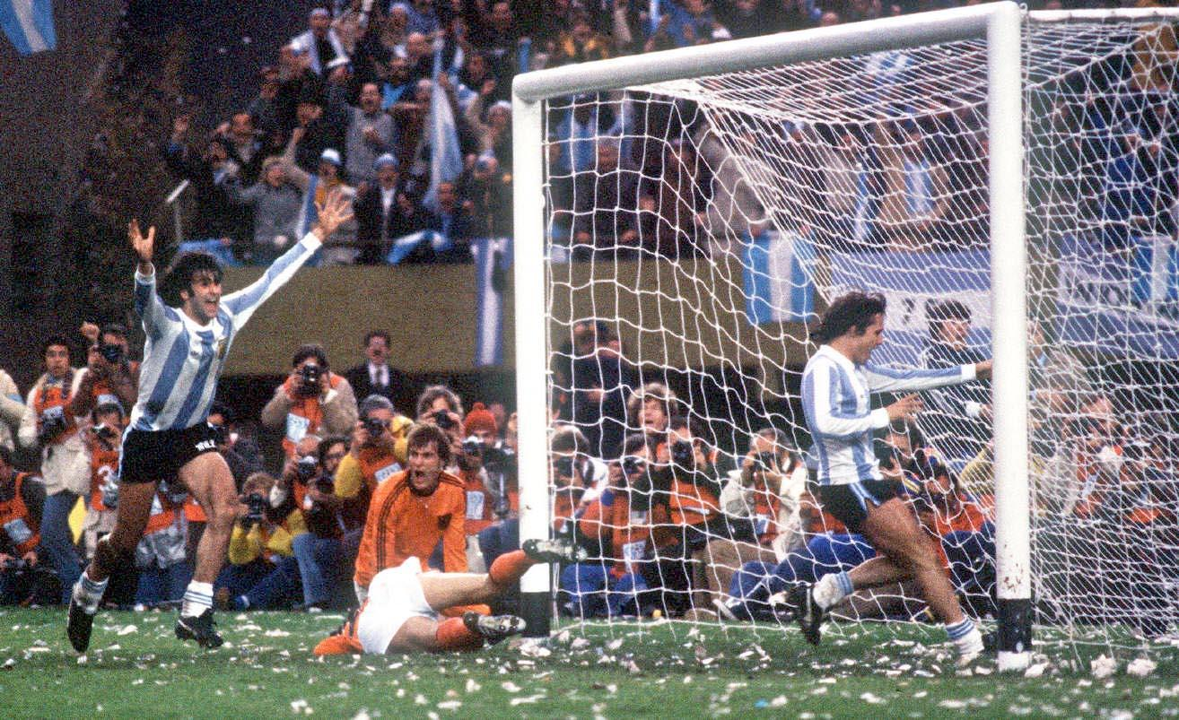 Kempes festejando uno de los goles en la final de la Copa Mundial 1978.